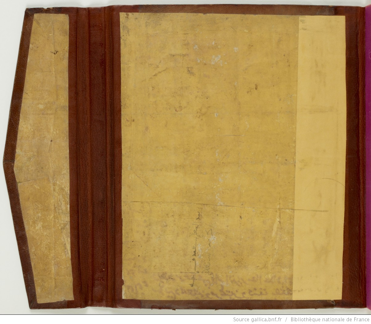 غلاف داخلي كتاب الطبلة لعلى بن احمد بن محمد الصفاقسي